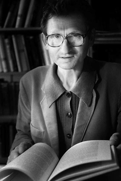 Jindřich Šilhán. Foto pořídil Jan Šafář Pentaconem SIX na film 6x6 cm v roce 1997 při portrétování zaměstnanců brněnské hvězdárny. Při sdílení uveďte autor: Jan Šafář a licenci CC4